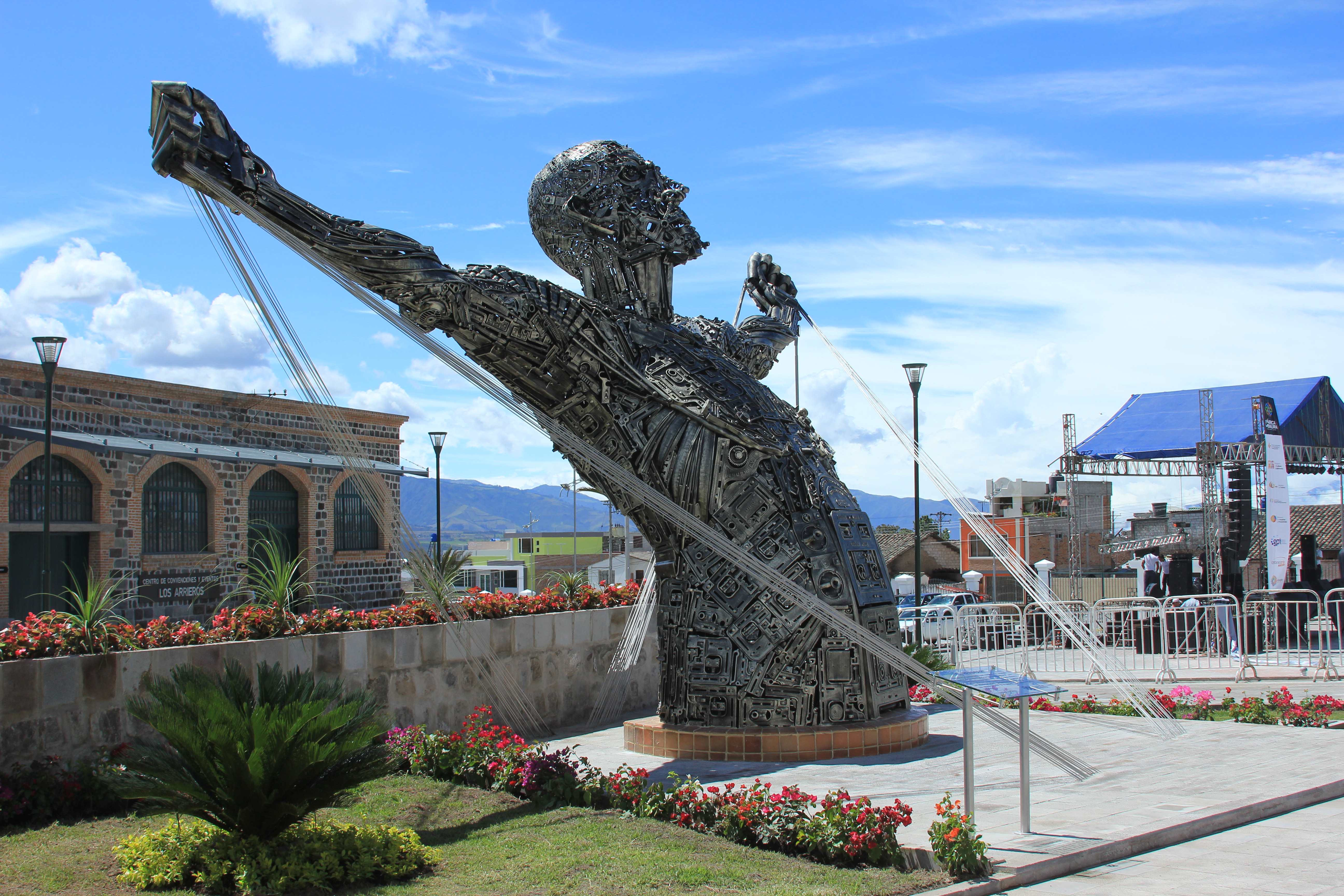 Fabrica_Imbabura (1)